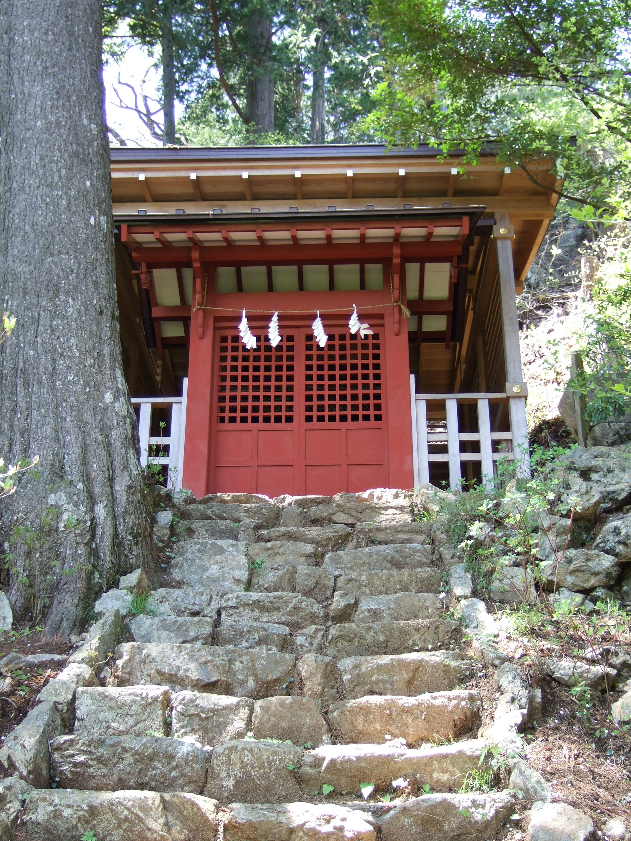 御岳山奥の院